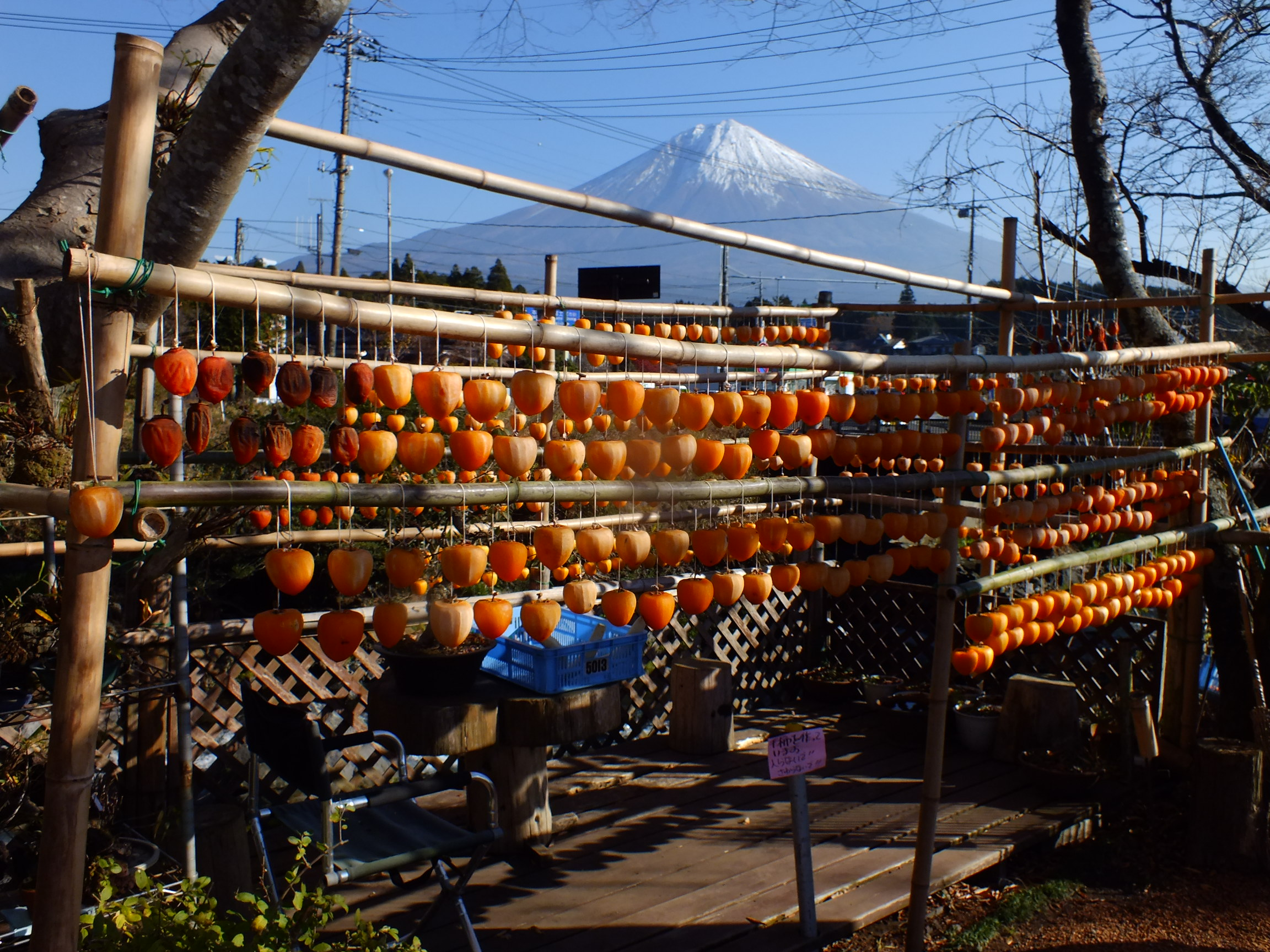 2013-12-02 Shiraito Falls, Fujinomiya(白糸の滝下流)